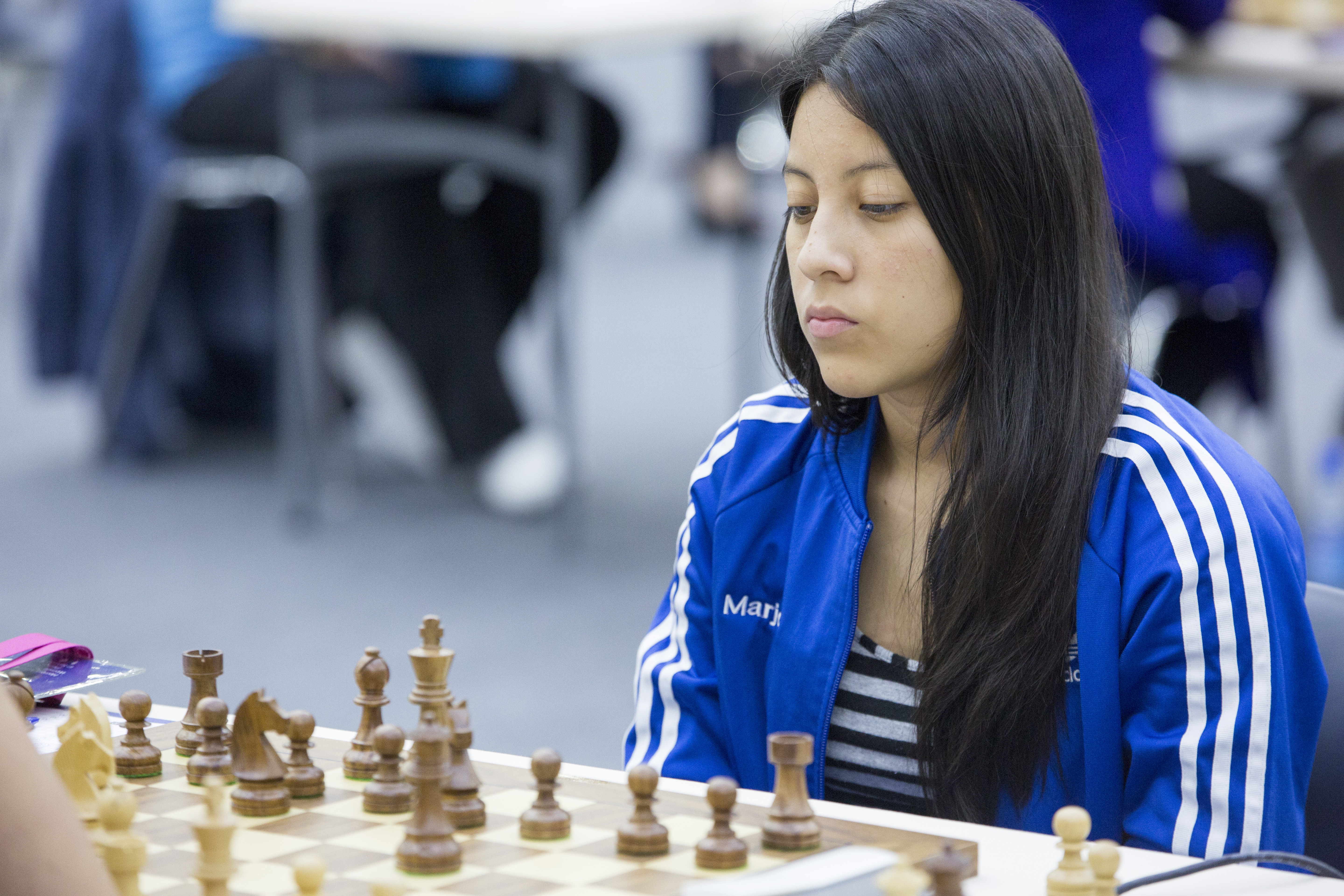 Olimpiadas de Ajedrez Baku 2016